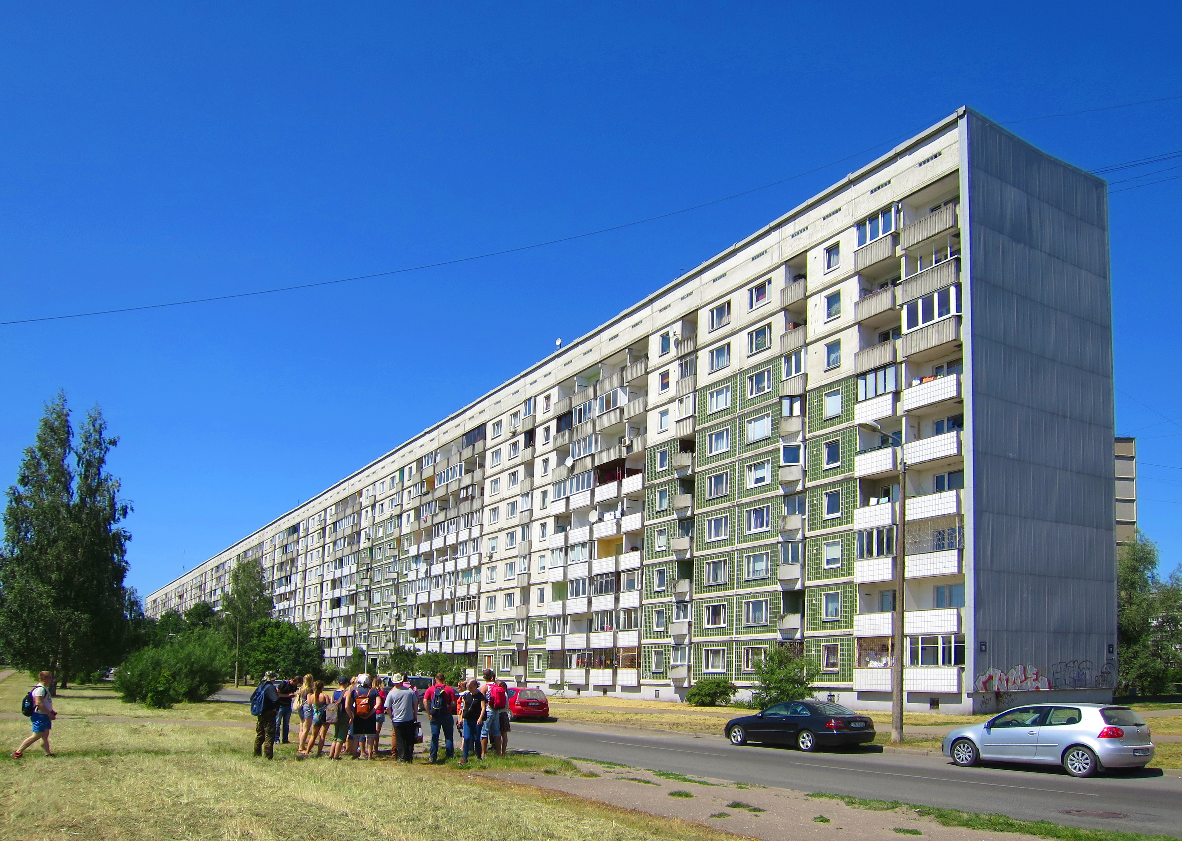 Ozolciema iela 18